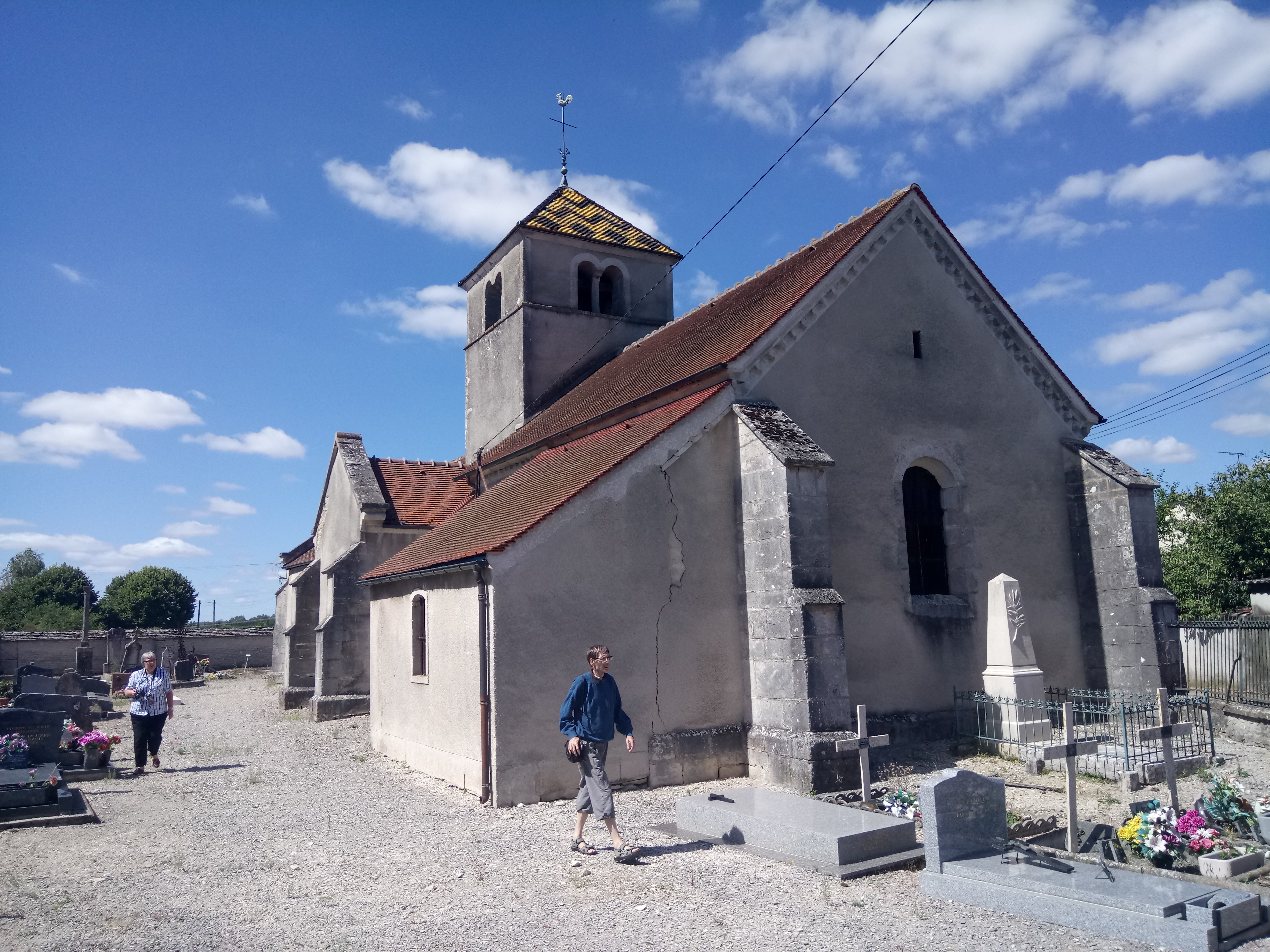 Kirko de Échevannes